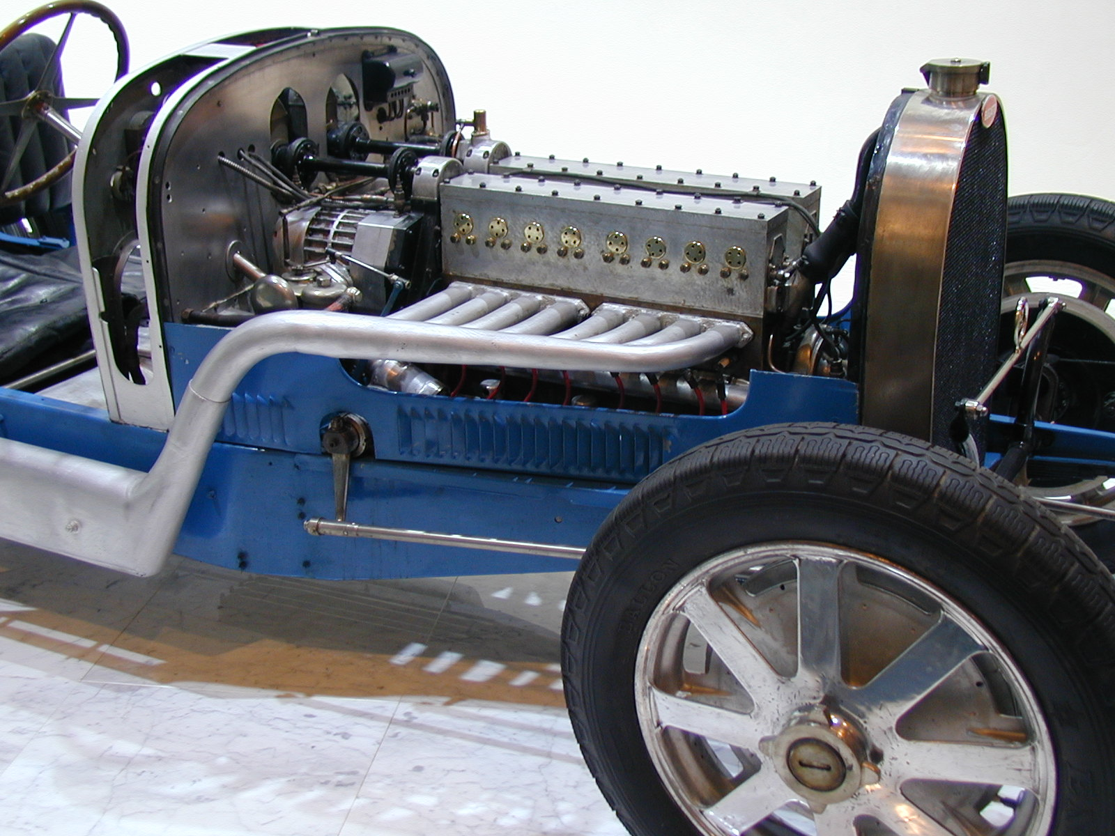 Chassis moteur de Bugatti Type 45 et Type 47 - moteur 16 cylindres en U